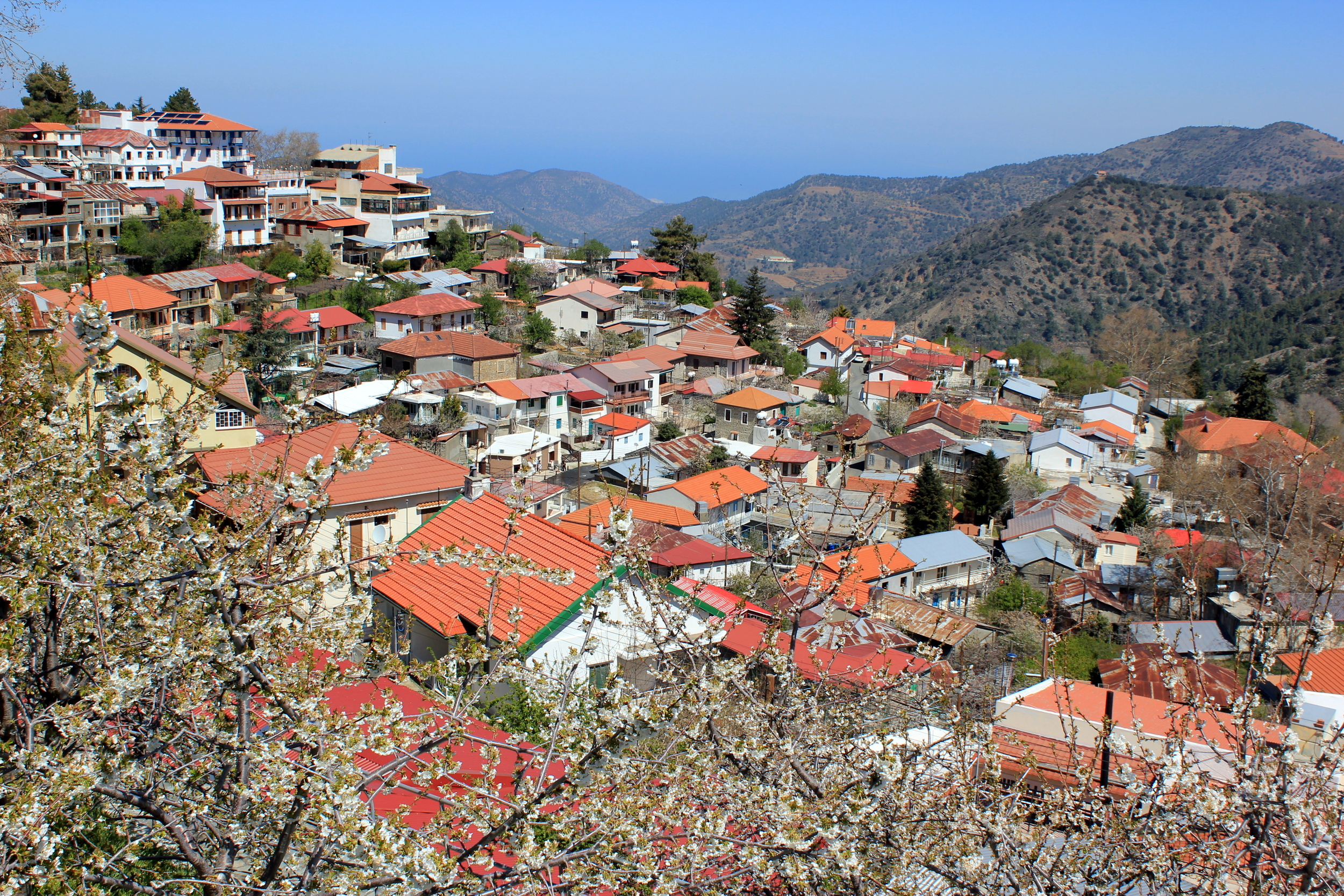 Blick auf Pedoulas im Troodos-Gebirge, Zypern.